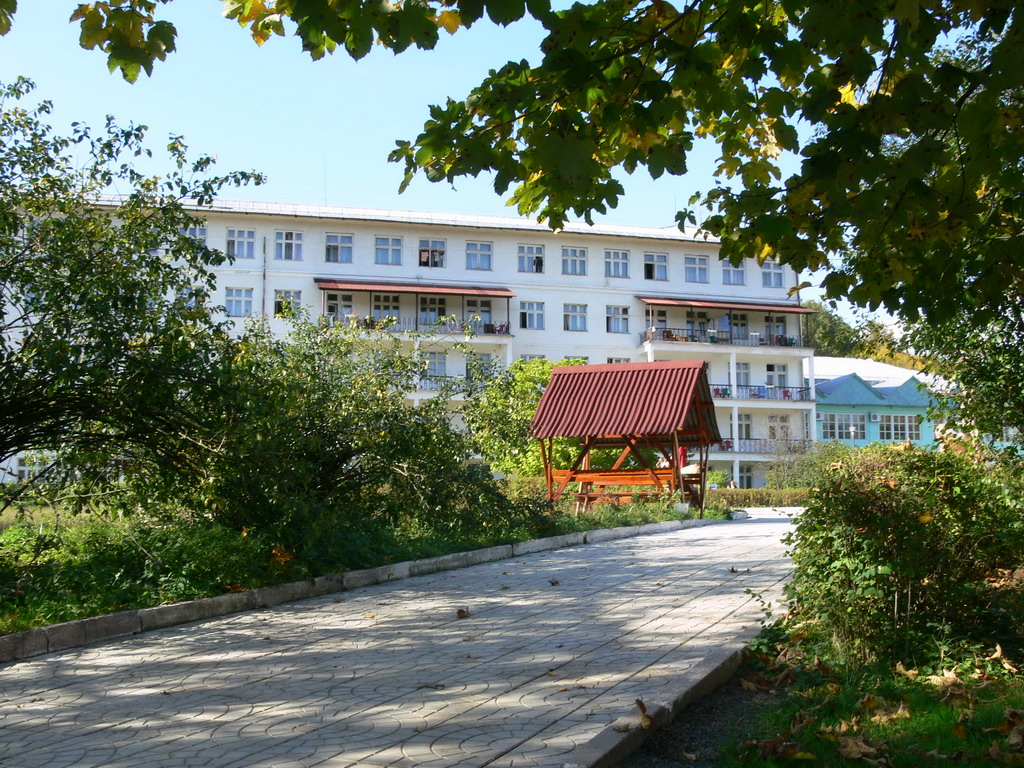 Санаторий Солнечное Закарпатье